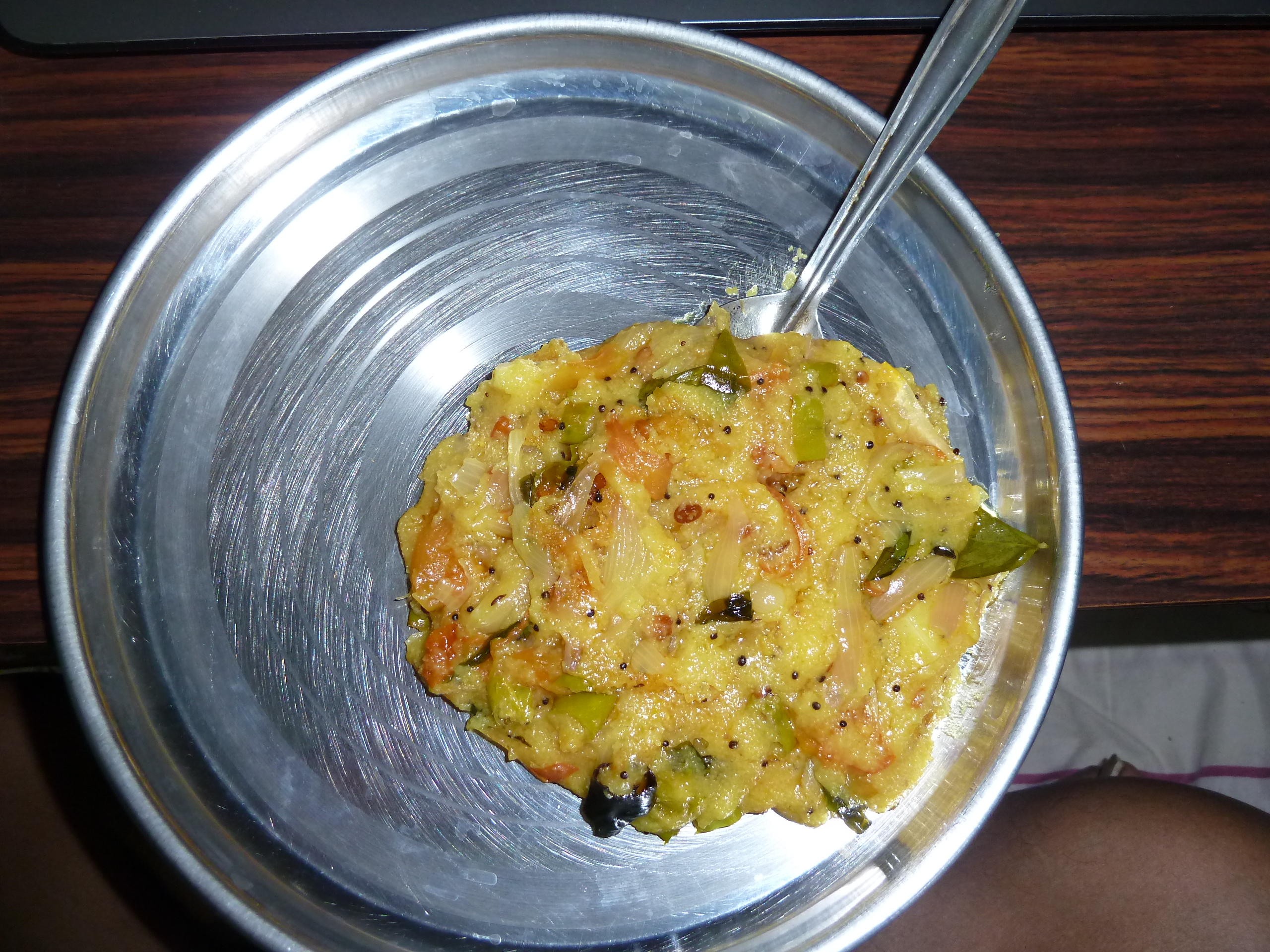 టమాట బాత్